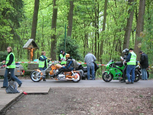 De entree van een motortreffen.